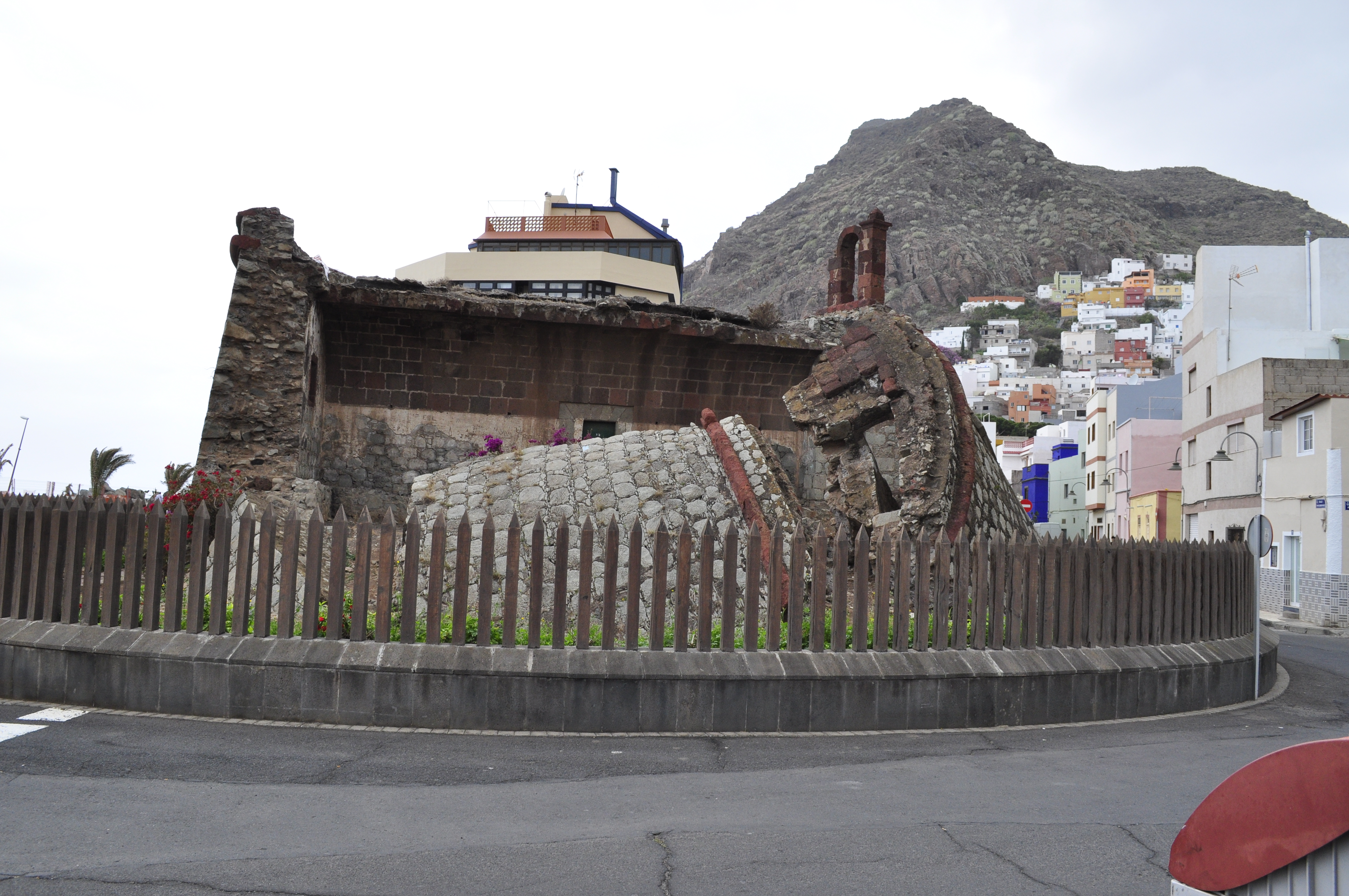 Von Unwettern zerstörter Festungsturm in San Andrés,Teneriffa